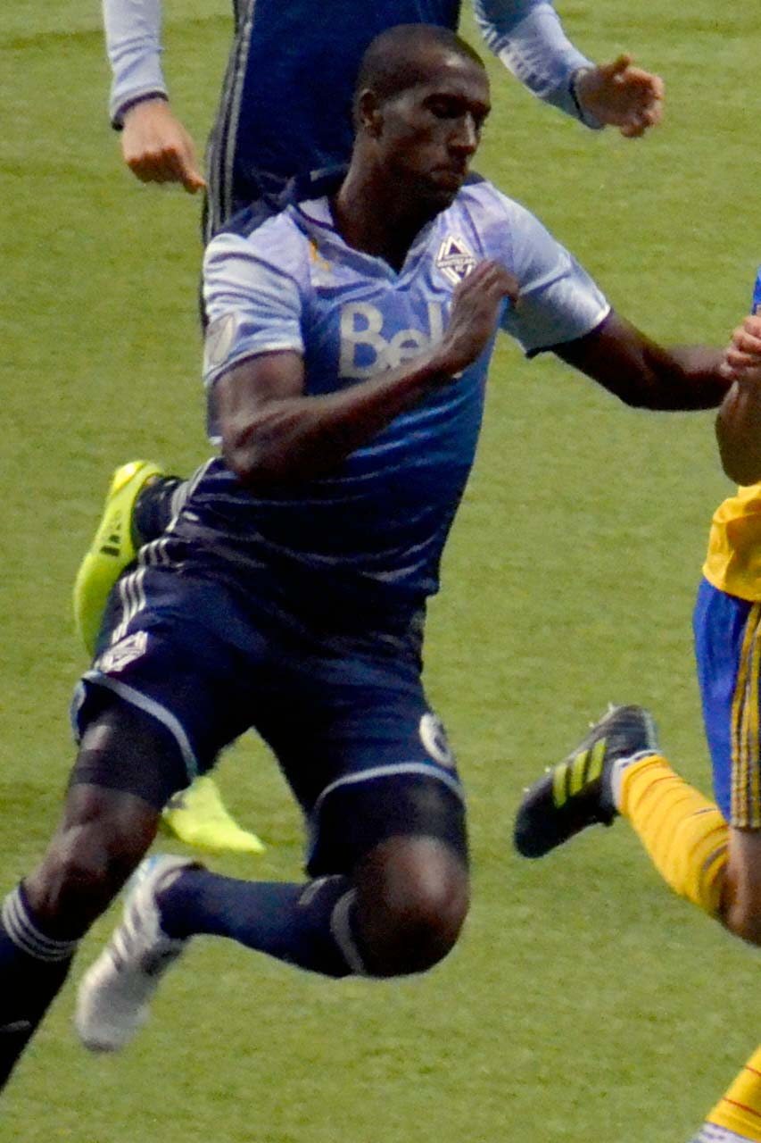 Vancouver v Colorado (23)